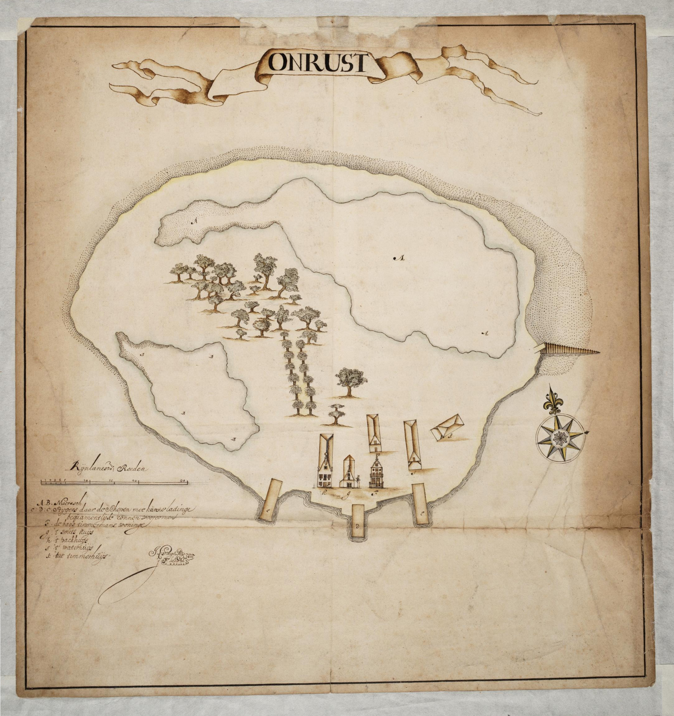 Manuscriptkaart van het eiland Onrust, gemonteerd uit 6 screenshots